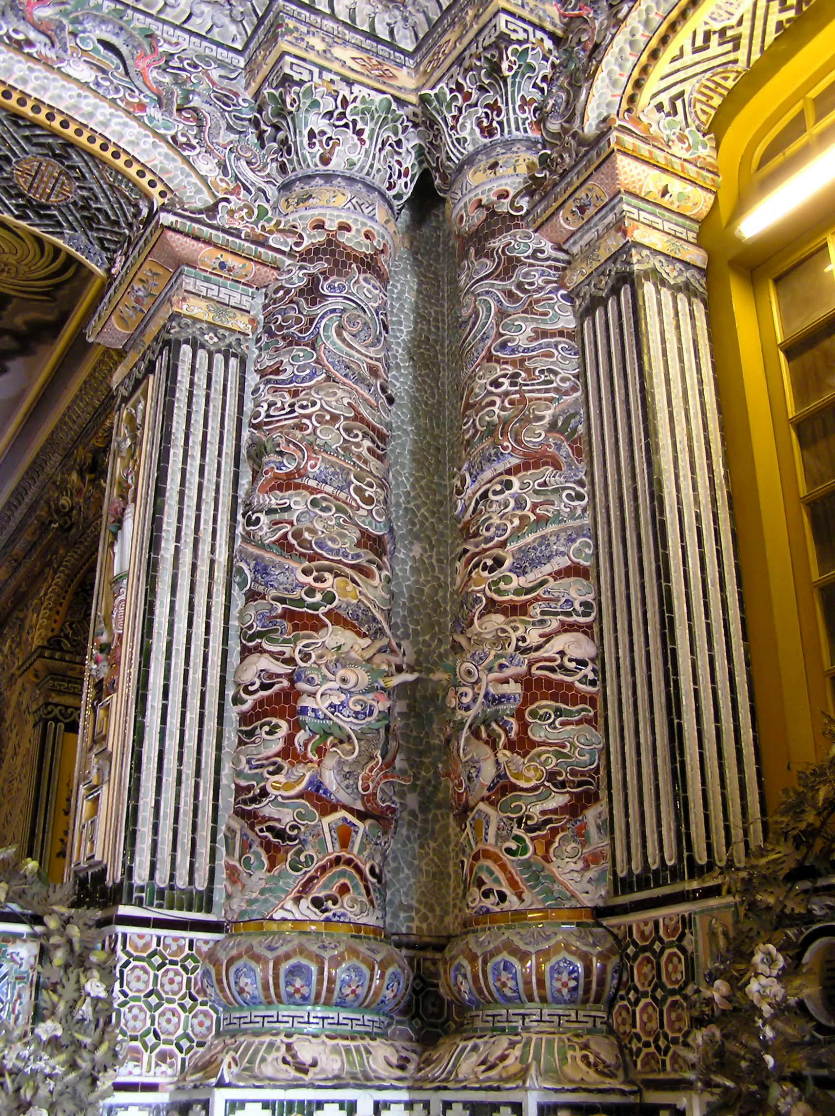 Tombeau de l'empereur Khải Định - Décor de porcelaine - Hué - Vietnam